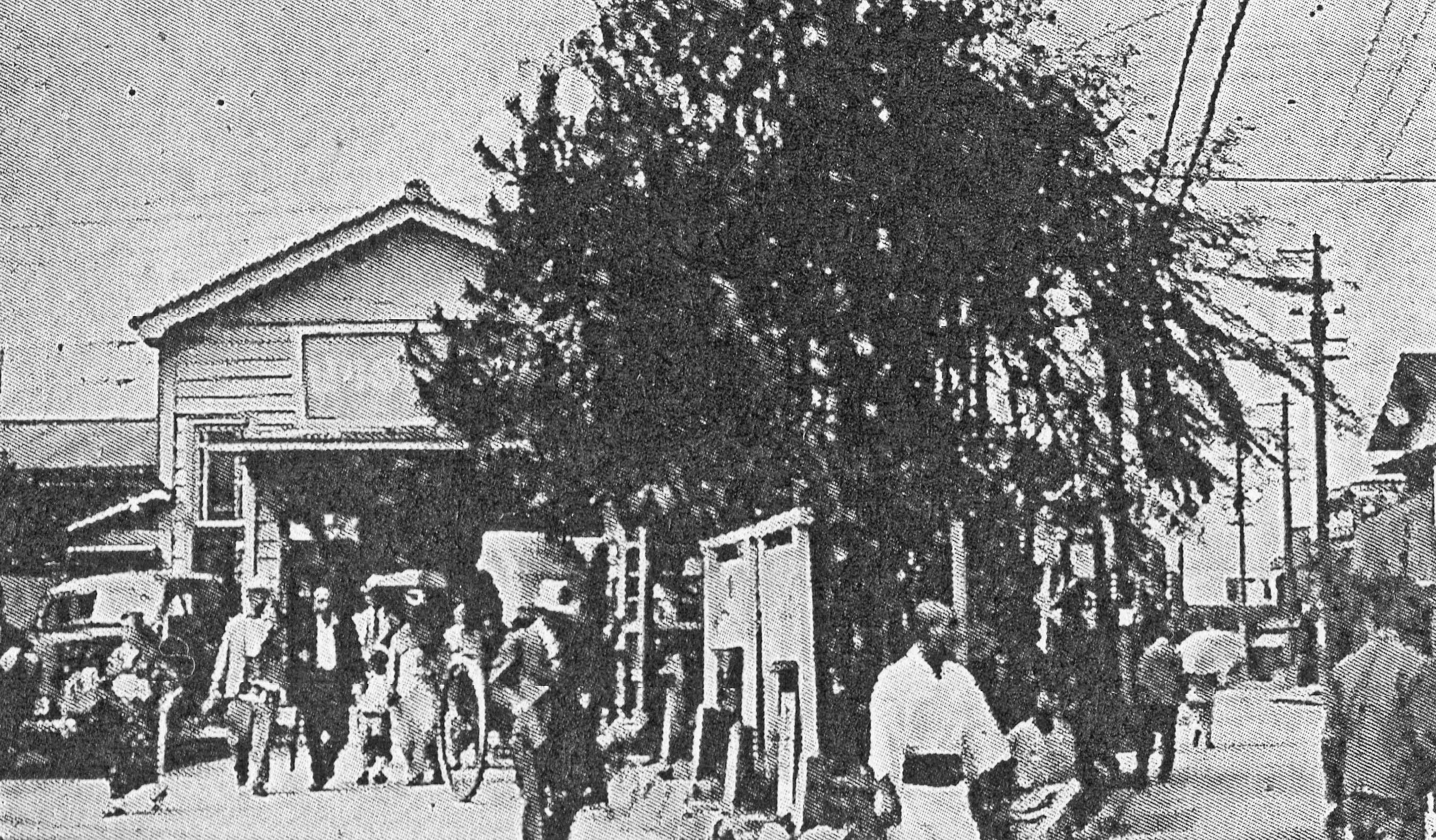 1940年頃の阪急伊丹駅